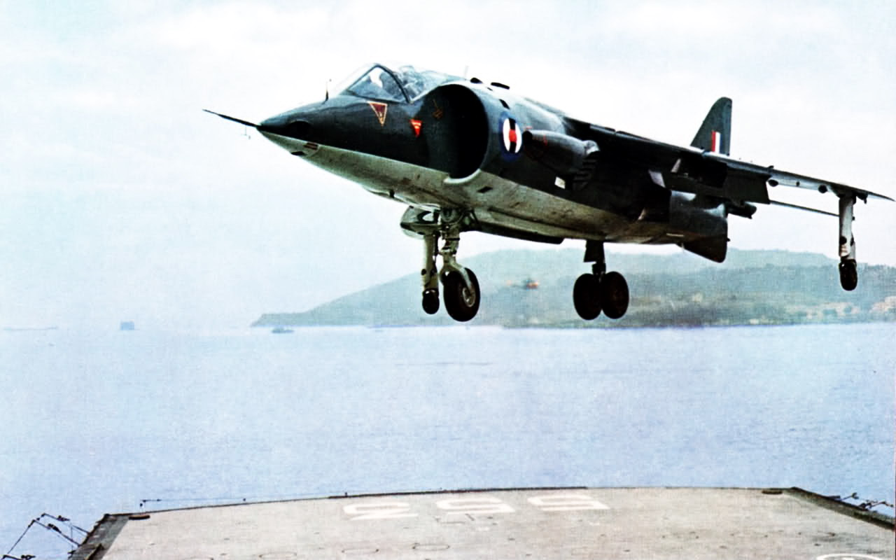 Test di atterraggio verticale da parte di un Harrier della Royal Navy sul ponte di volo dell'incrociatore italiano Andrea Doria